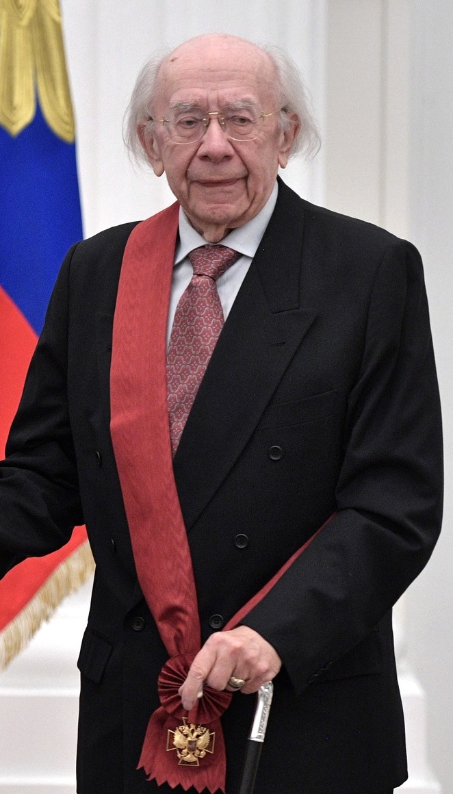 На церемонии вручения государственных наград. Орденом «За заслуги перед Отечеством» I степени награжден Геннадий Рождественский – профессор Московской государственной консерватории имени П.И.Чайковского